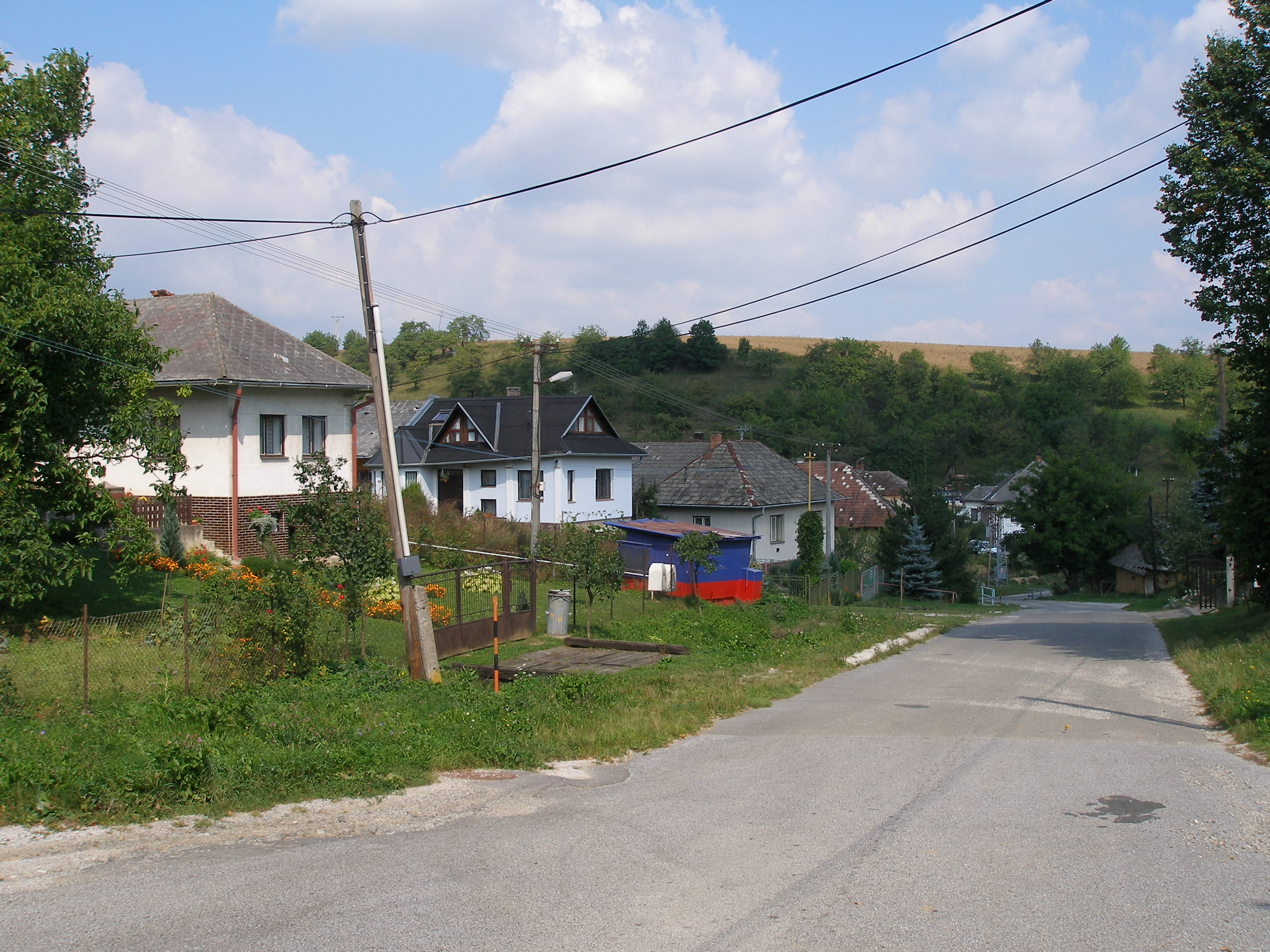 Šarišská obec Ondrašovce